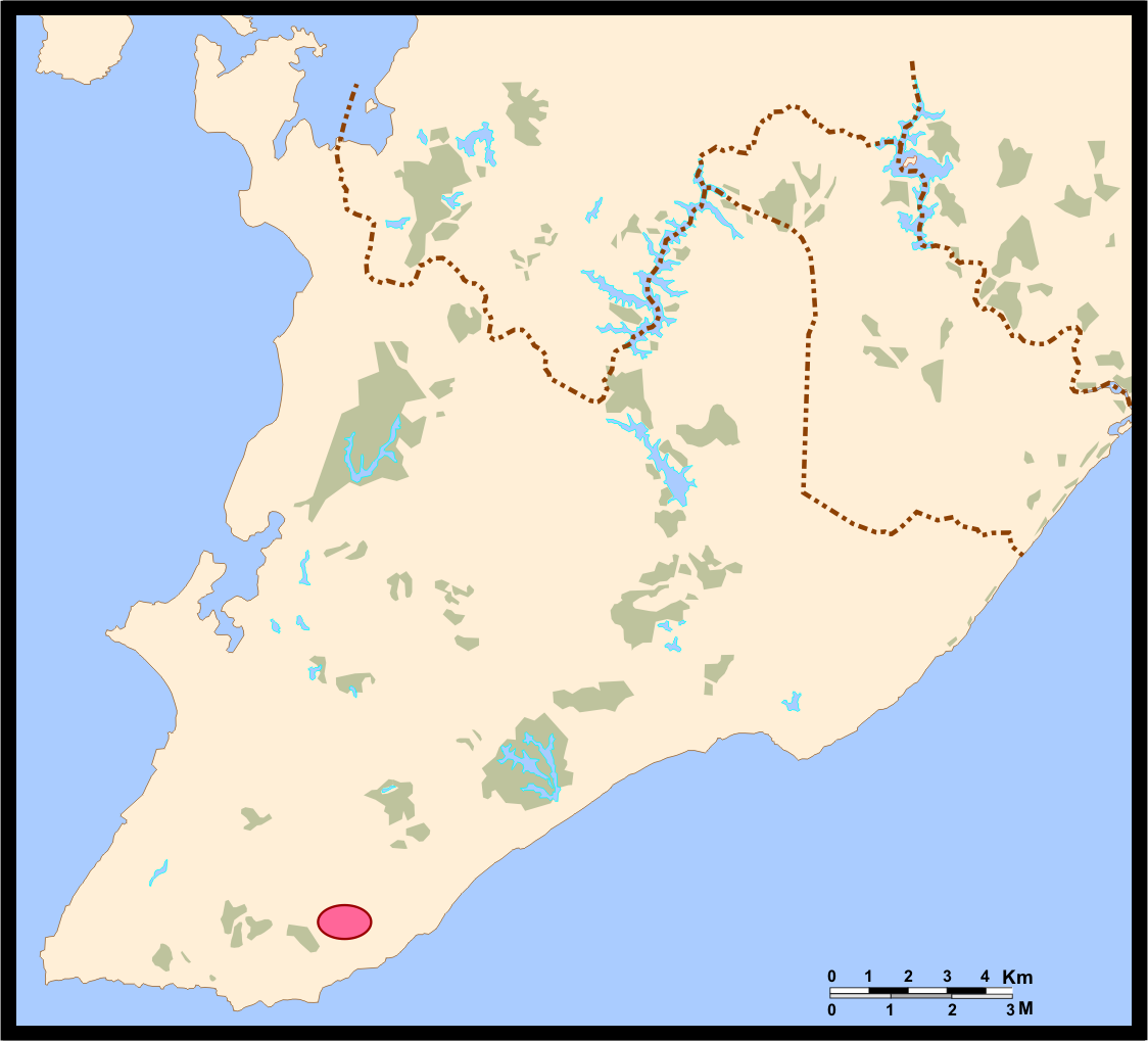 Mapa de Salvador (Bahia, Brazil) - Localização do bairro do Itaigara.